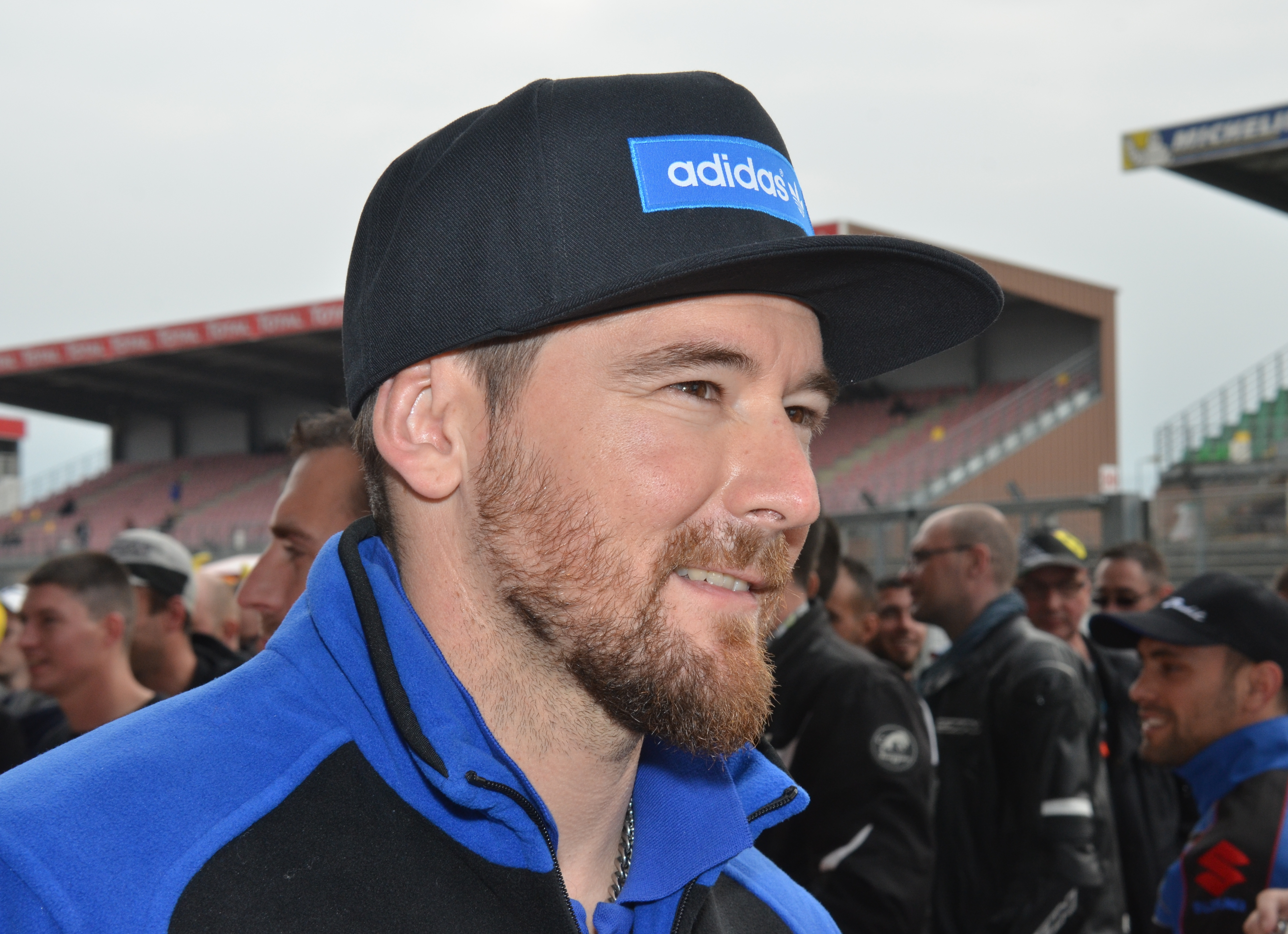 Damian Cudlin aux 24 heures du Mans moto 2015